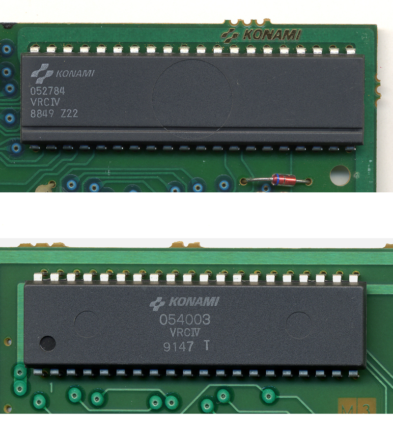 コナミ ファミコン用ソフト「グラディウス2」(RC832)で採用されているVRC IV(上)と「がんばれゴエモン外伝2〜天下の財宝〜」(RC857)で採用されているVRC IV(下)